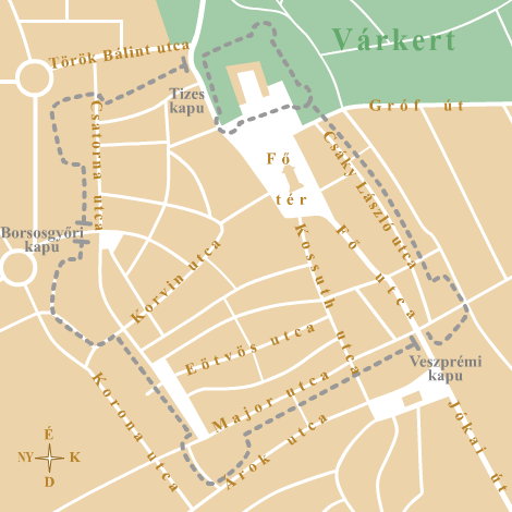 The probable position of the former Pápa castle projected to the present-day street layout Az egykori pápai vár falainak valószínű helye a mai utcahálózatra vetítve.